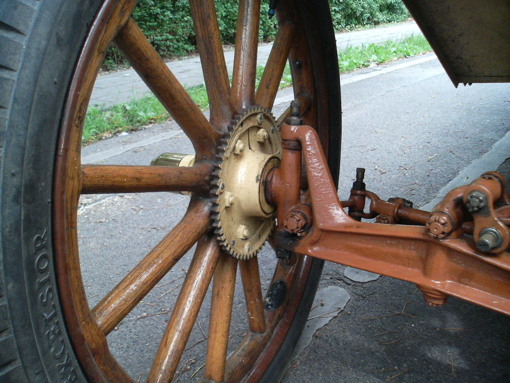 alter Ford